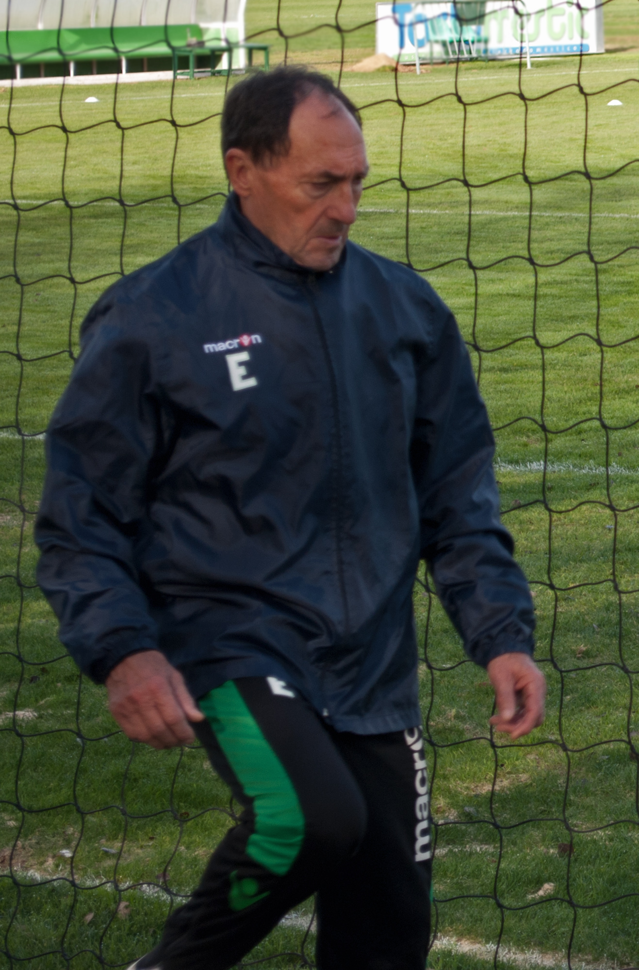 José Ramón Esnaola, futbolista. Ciudad deportiva del Real Betis